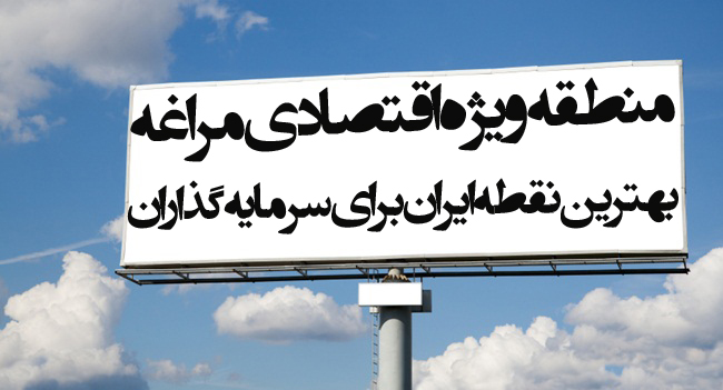 منطقه ویژه اقتصادی سهند مراغه